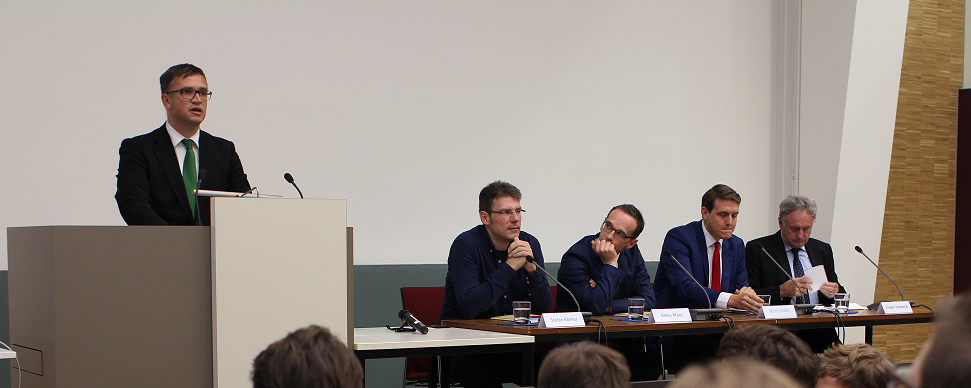 HDis2014 mit HDiS 2014 mit Prof. Dr. Sebastian Harnisch, Stefan Körner (Vorsitzender des Bundesvorstands der Piratenpartei), Heiko Maas (Bundesminister der Justiz und für Verbraucherschutz), Moritz Rödle (Saarländischer Rundfunk),Jürgen Storbeck (ehemaliger Direktor von EUROPOL).